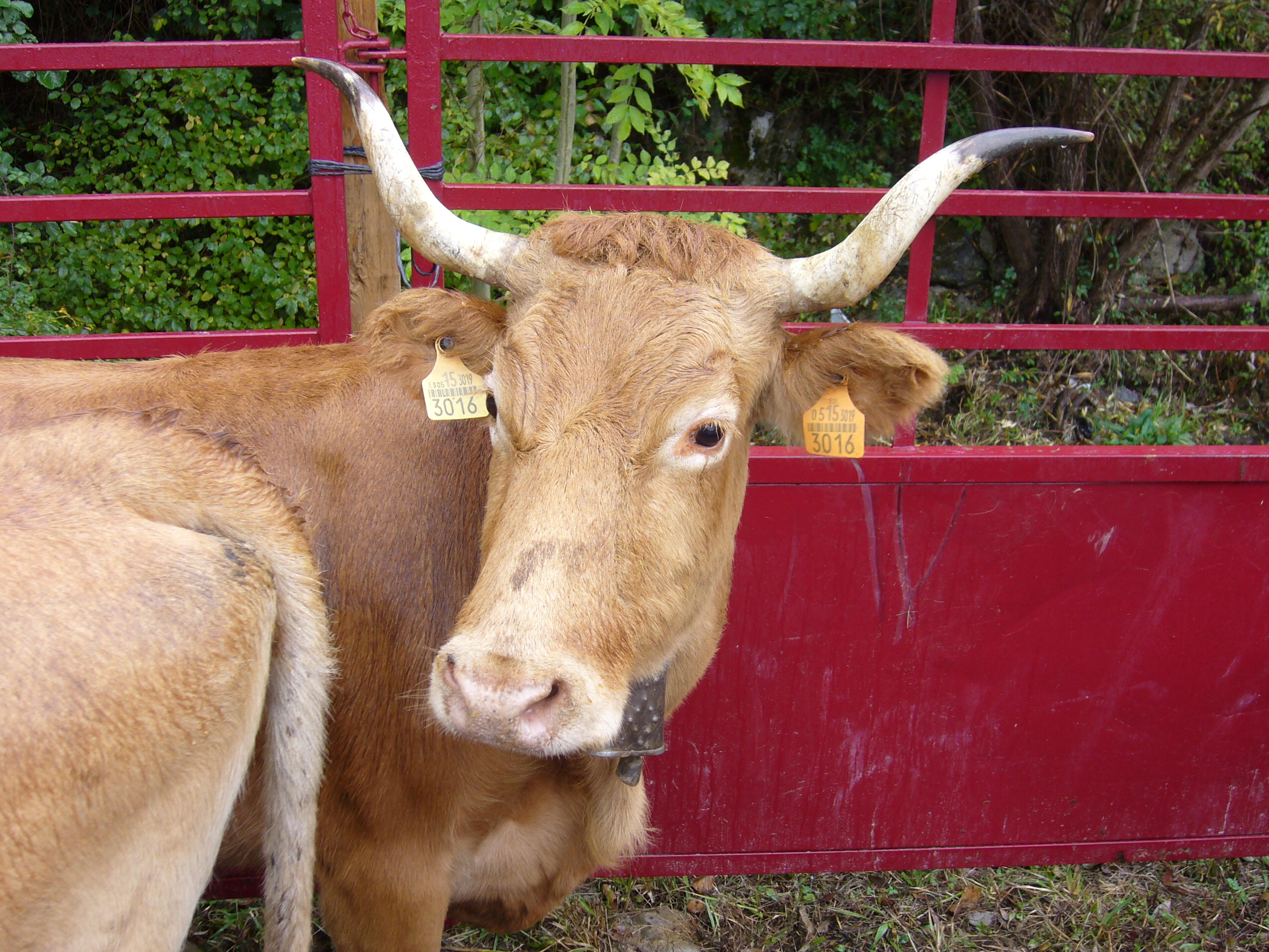 Behi betizu baten burua.